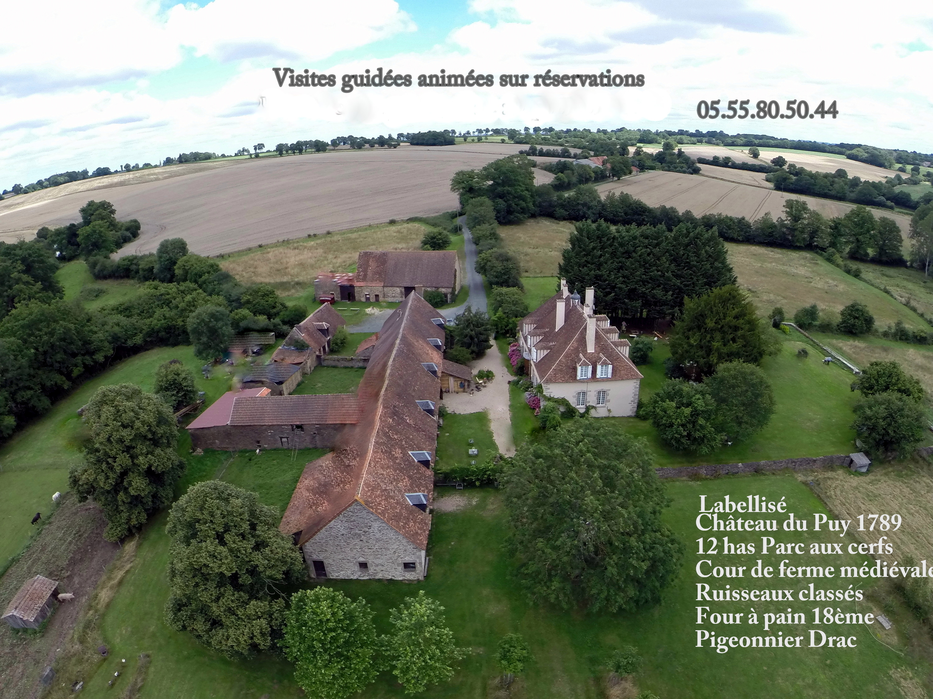 Domaine du château du puy